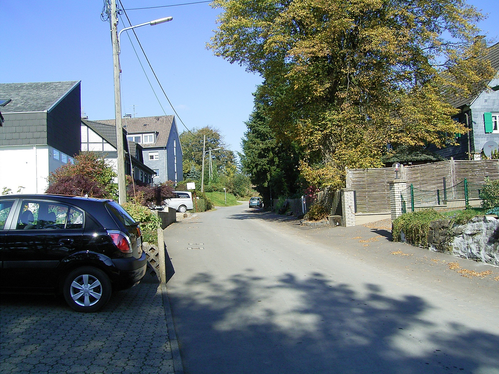 Radevormwald